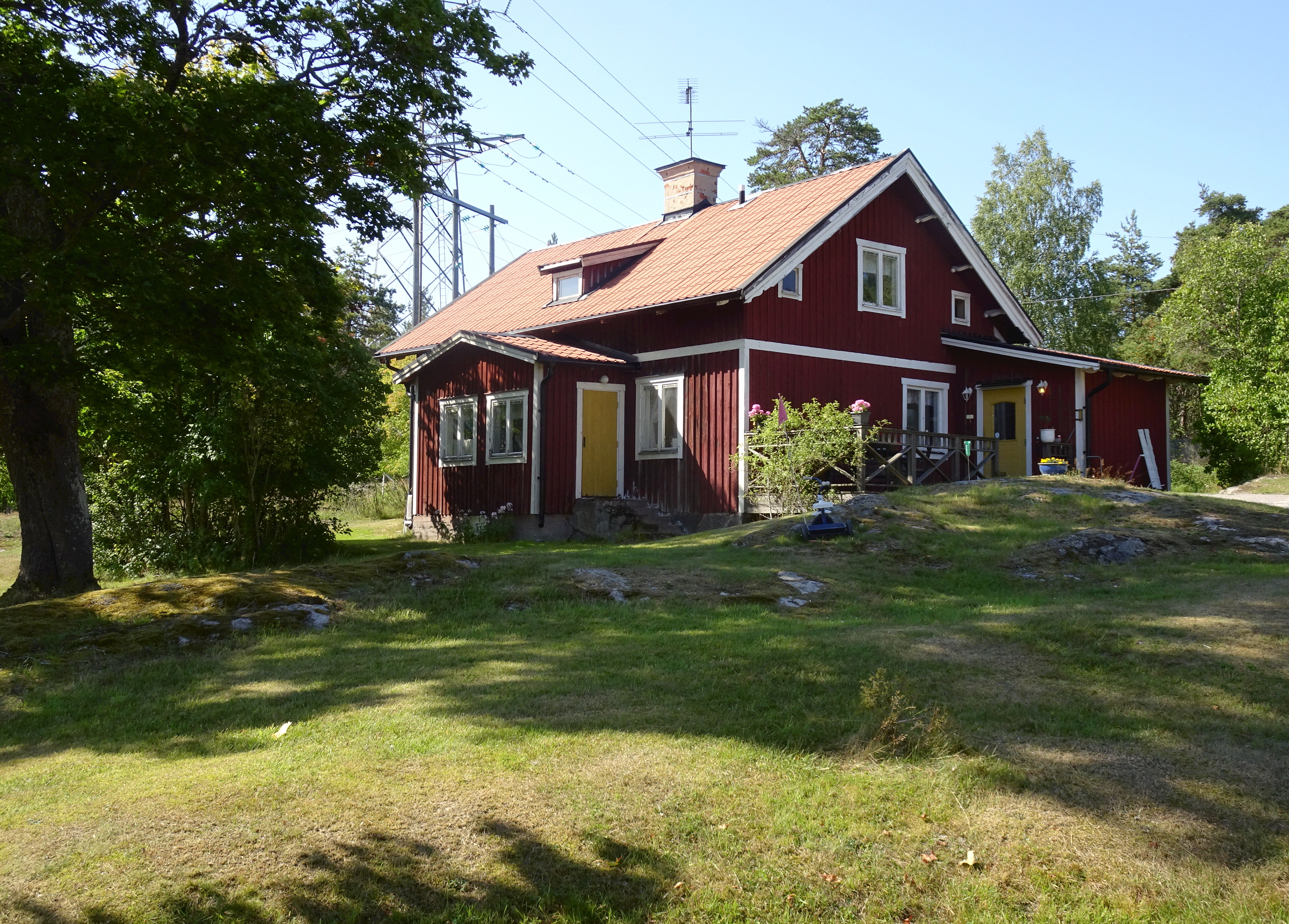 Gården Högmora, Nacka kommun, hette en gång "Lilla Oxmora" och lydde under Erstavik